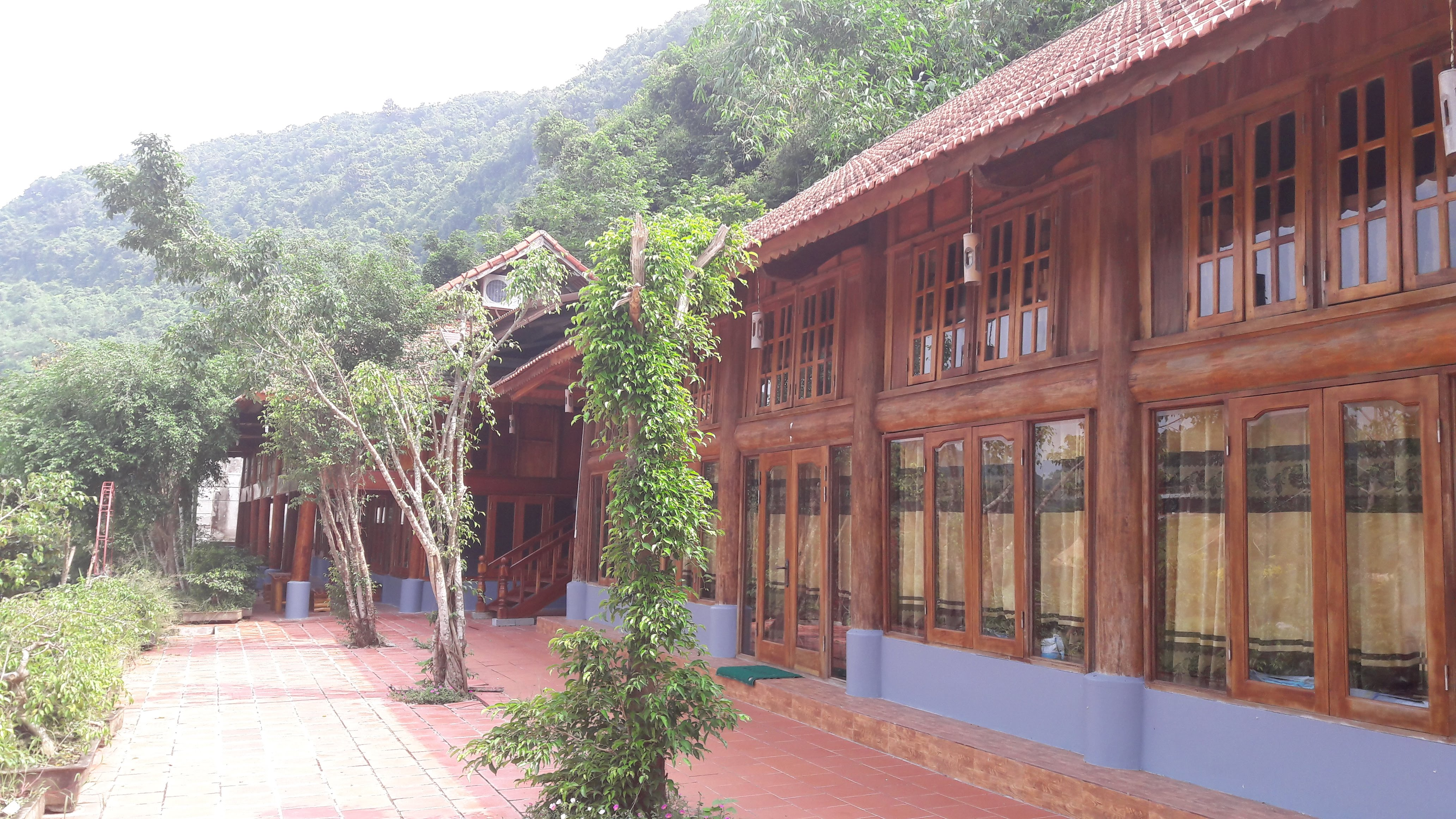 Khu phòng nghỉ tại Thung Nham